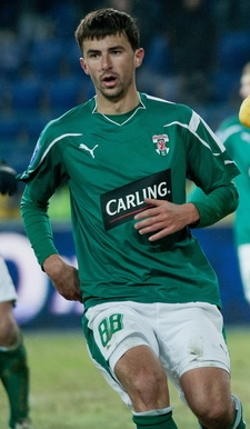 Андрей Петрович Гурский — украинский футболист, защитник.